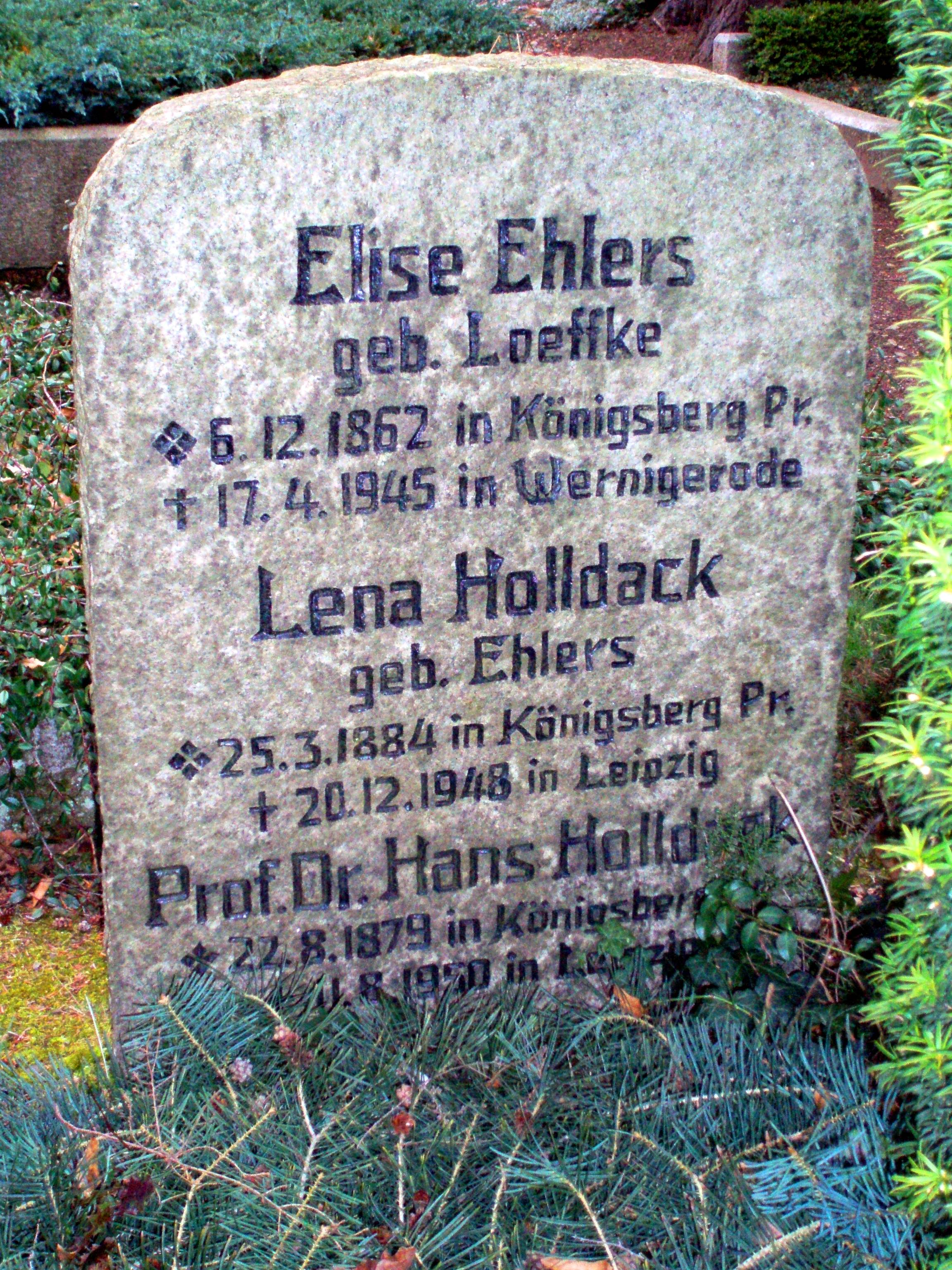 Grab von Prof. Dr. Holldack in Wernigerode